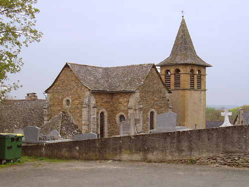 Eglise Saint Marcel (Conques)